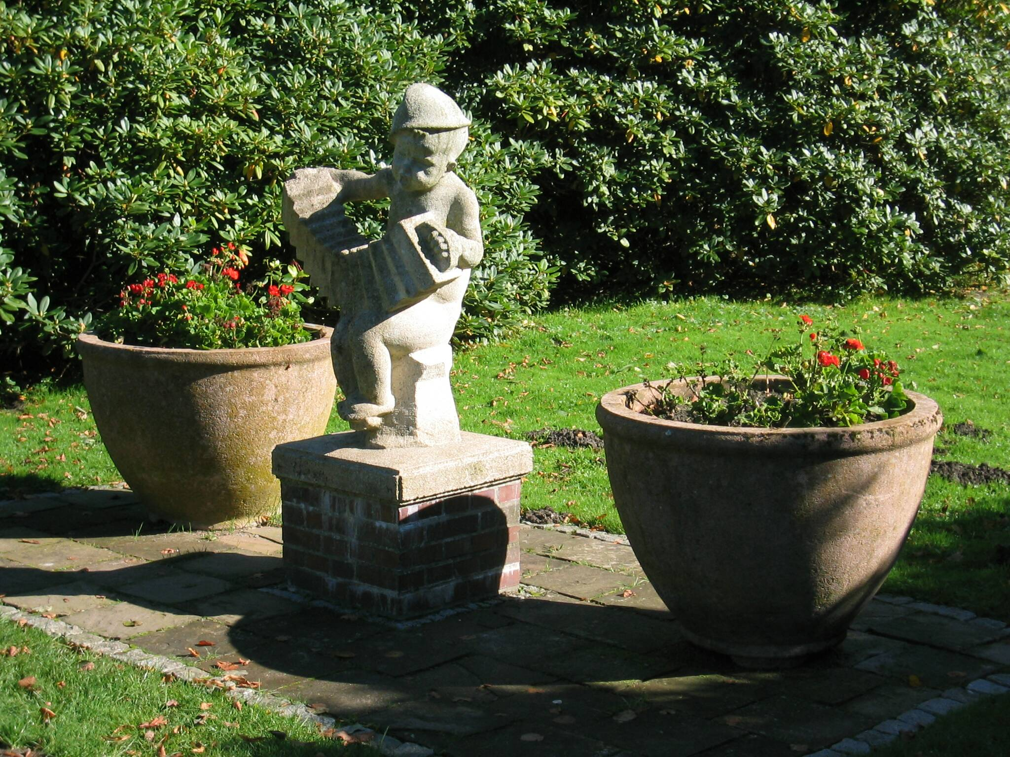 Skulptur von Hein_Mück im Bremerhavener Bürgerpark